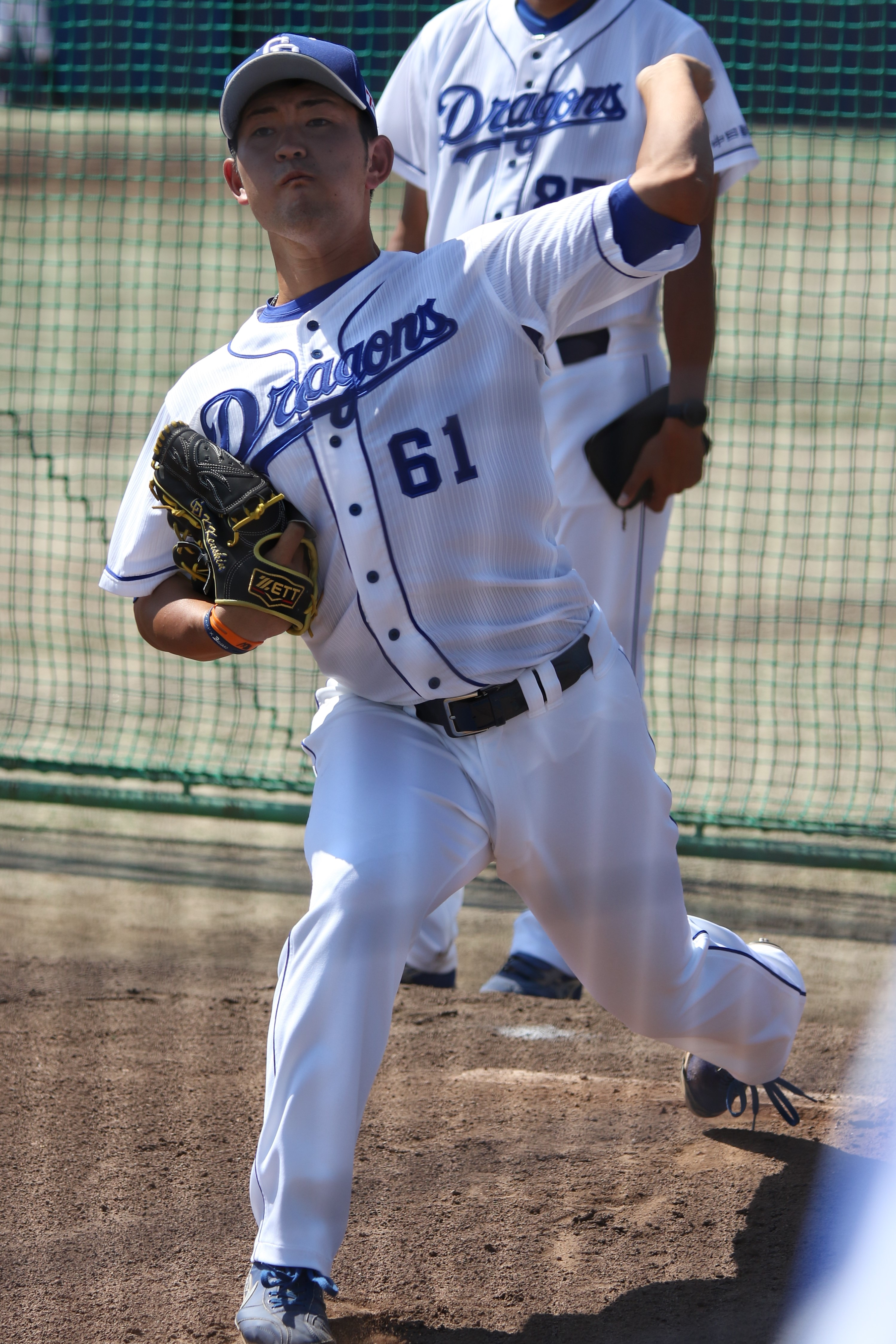 投球練習中の垣越